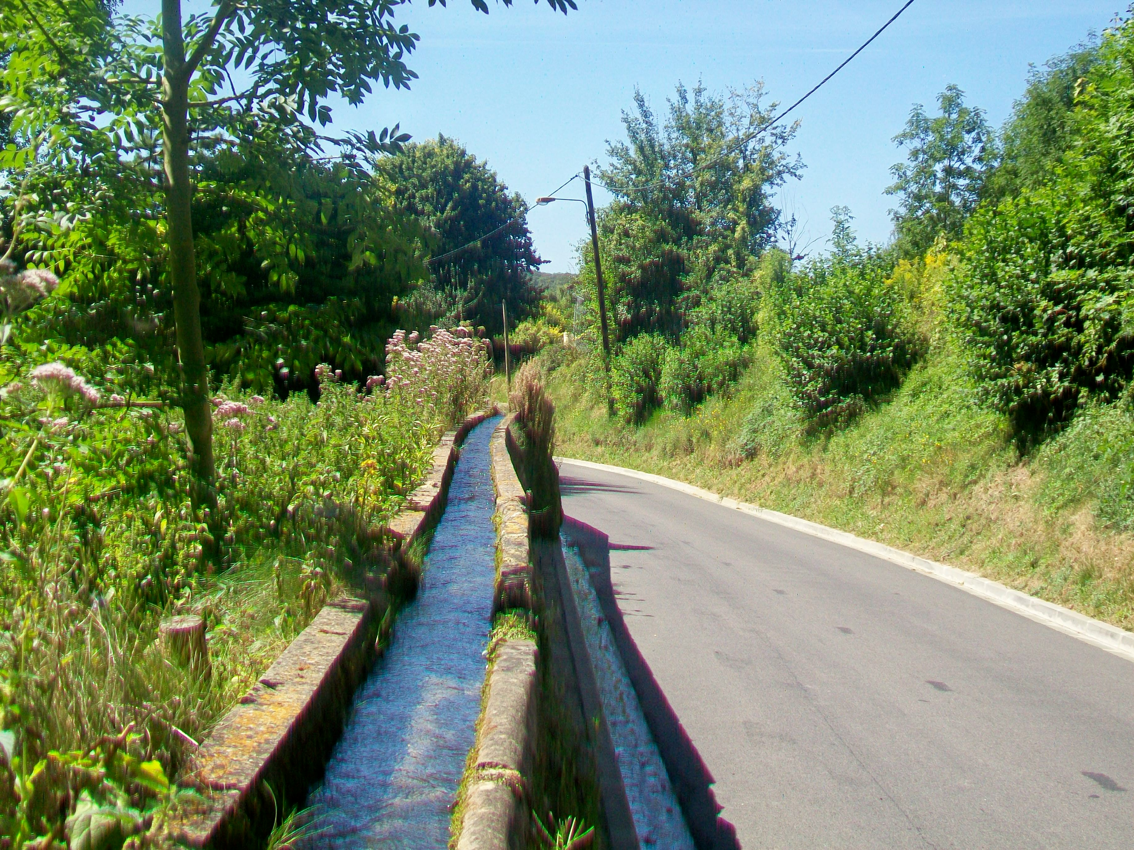 Le bief des deux moulins (moulin d'en-Haut et moulin d'en-Bas), rue François-Foucard, à l'est du village. Il s'agit d'un ruisseau détourné.